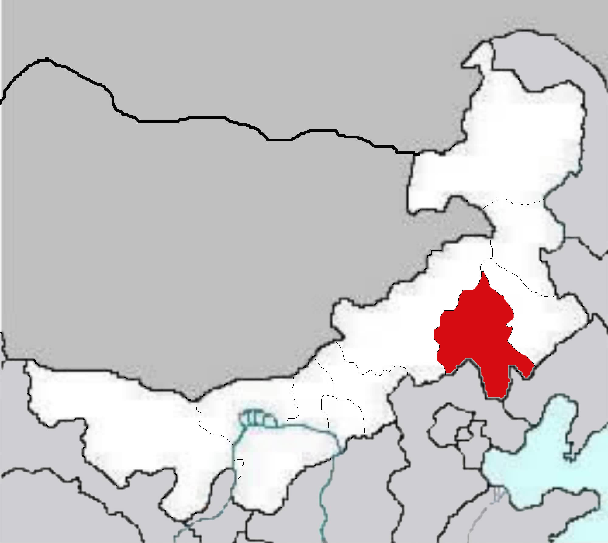 Inner Mogolia Maps